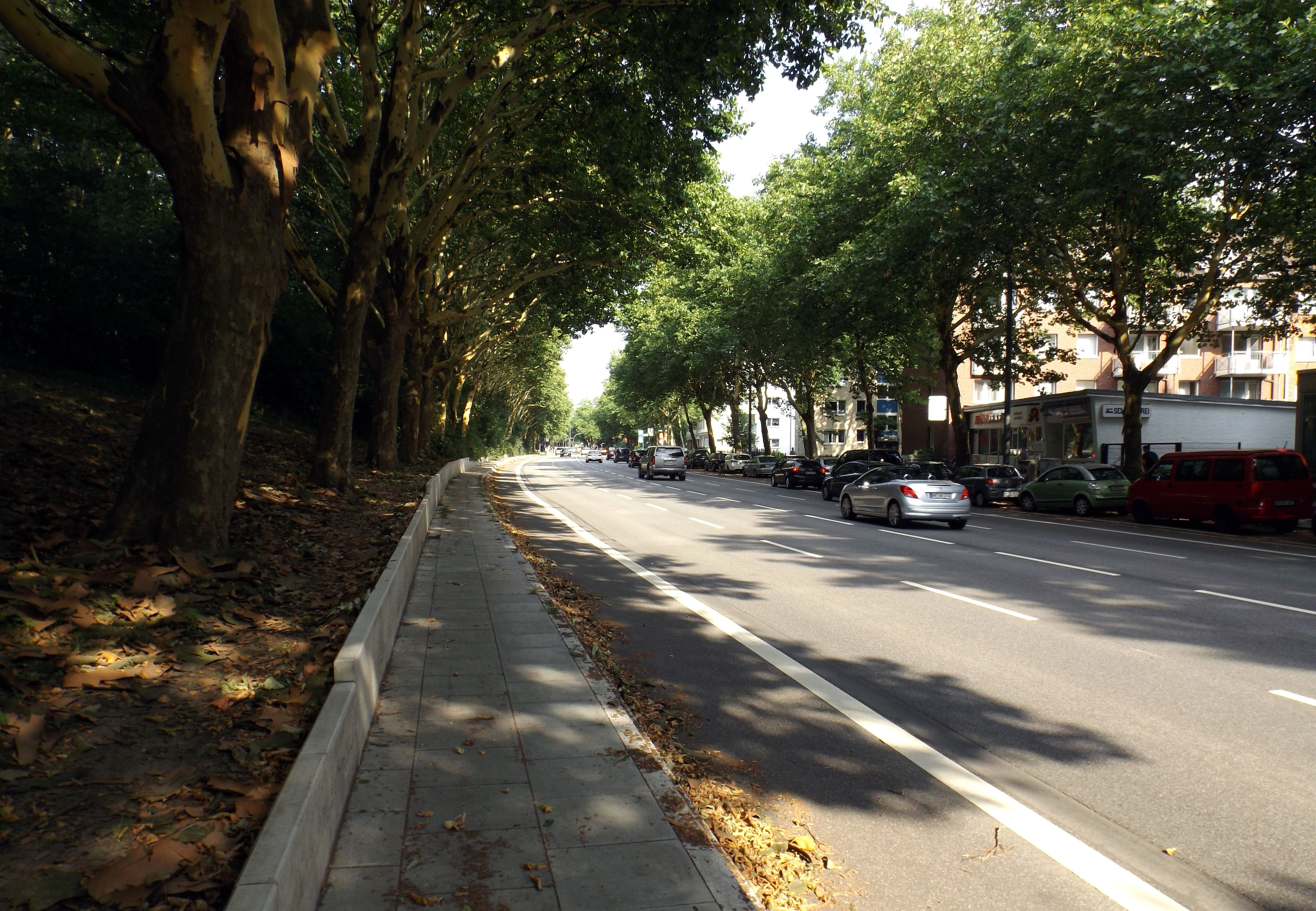 Hammer Landstraße in Hamburg-Hamm, Blickrichtung stadtauswärts; links der unbebaute Geesthang, rechts Wohnbebauung und Kleingewerbe